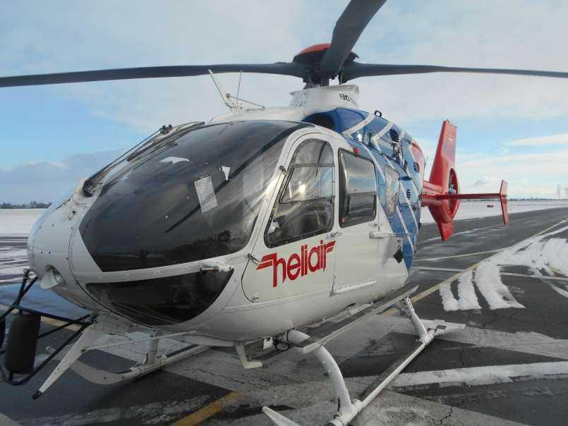 Helikoptera (heliair) ČR